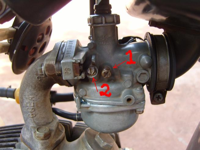 Carburador Biz 100CC